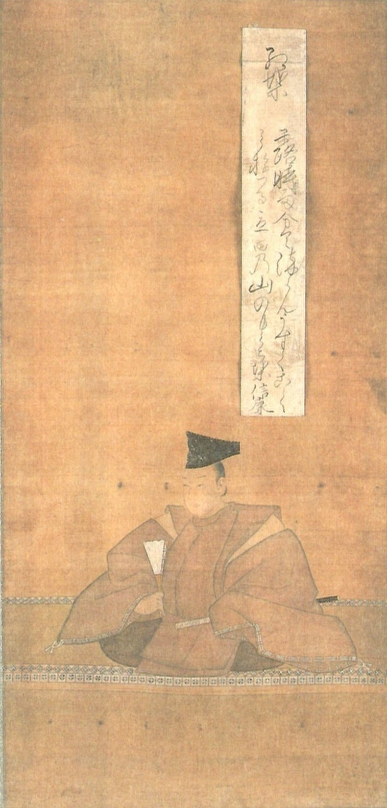 松平信康の肖像。